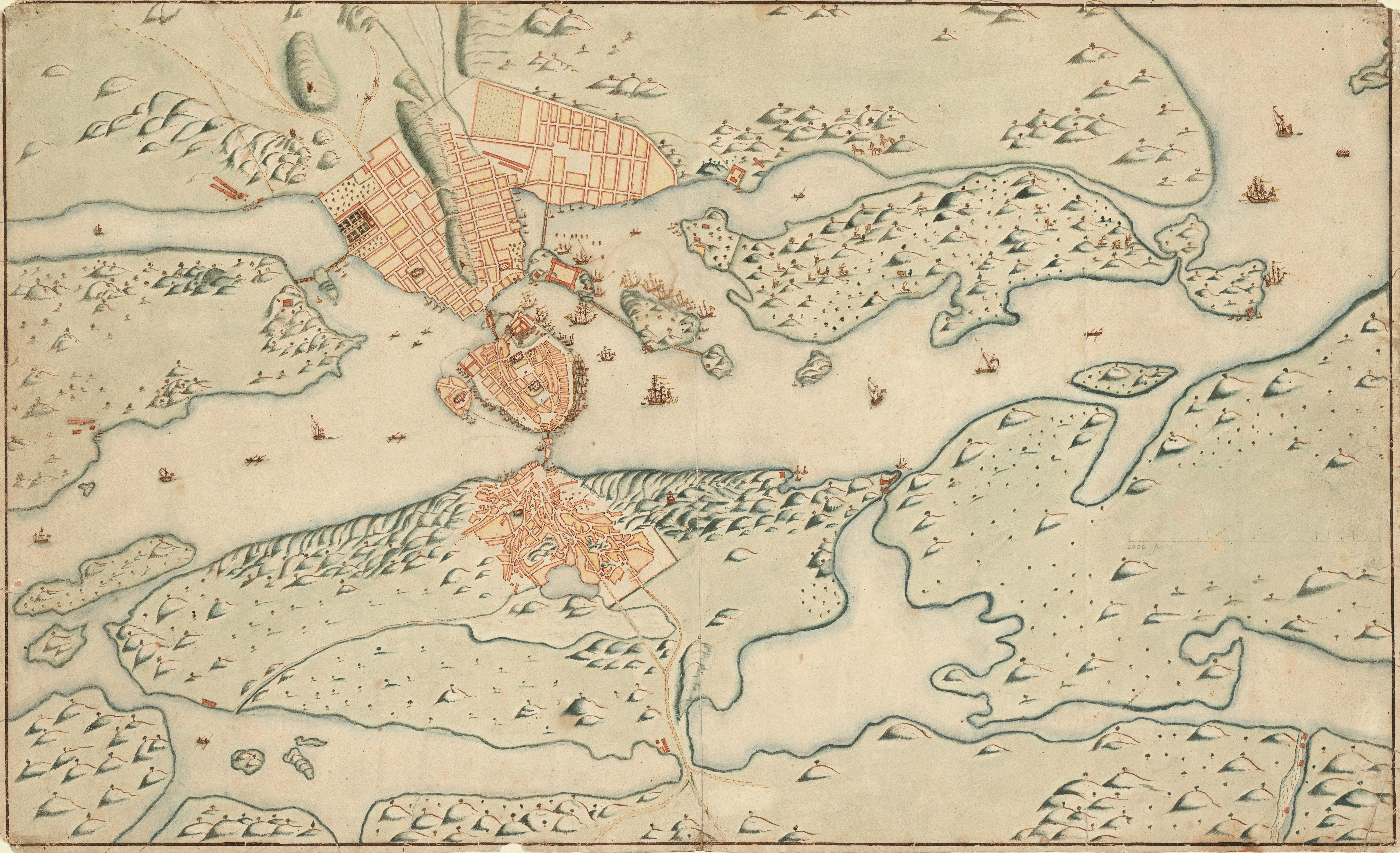 En Stockholmskarta från 1642 med generalplan för Norrmalm och Ladugårdslandet från 1640 och betecknas som Stockholms äldsta handritade karta.